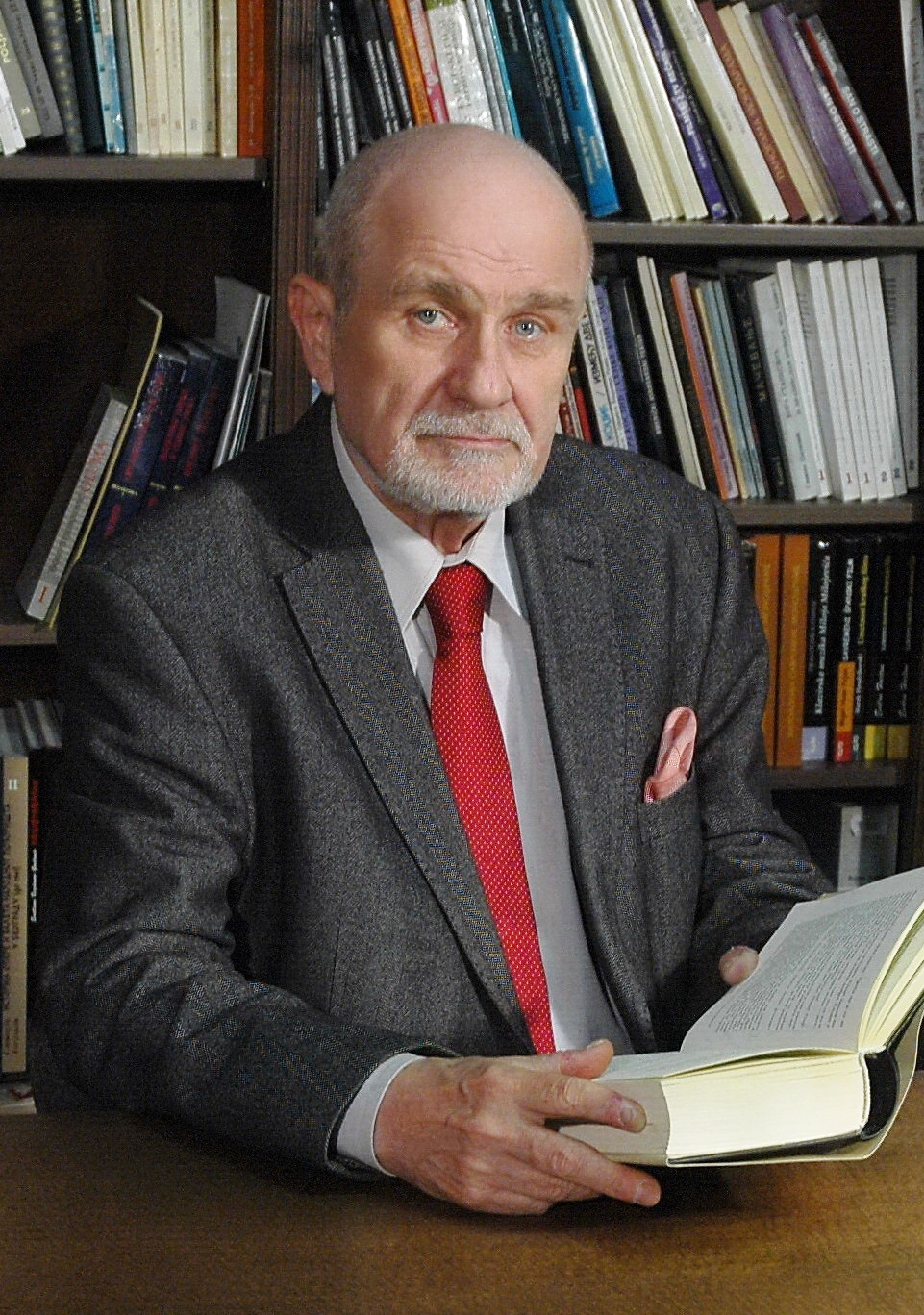 Srpski (latinica): Predsednik Saveta i direktor Akademije umetnosti u Beogradu